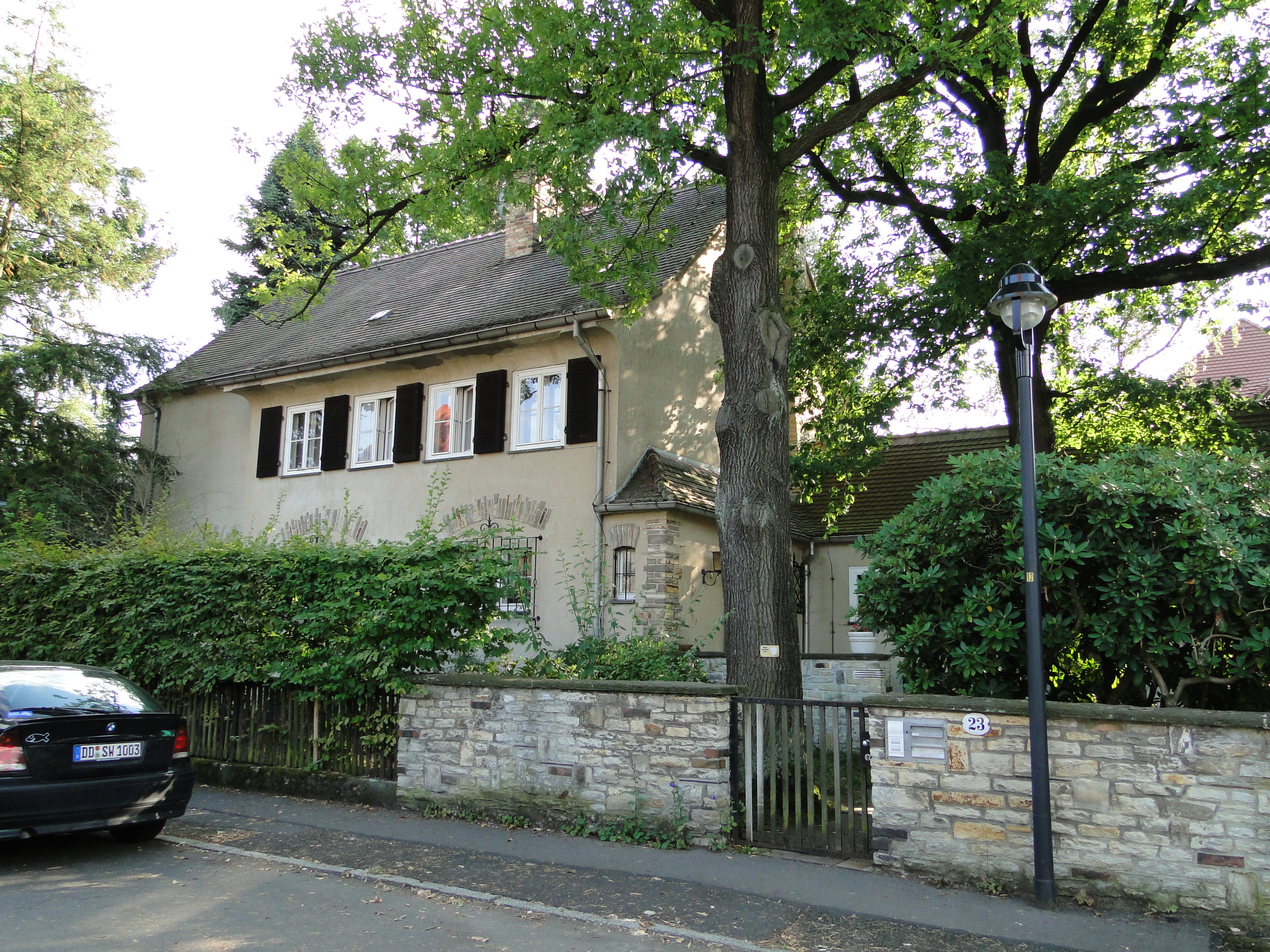 Kulturdenkmal Am Bauernbusch 23 Dresden